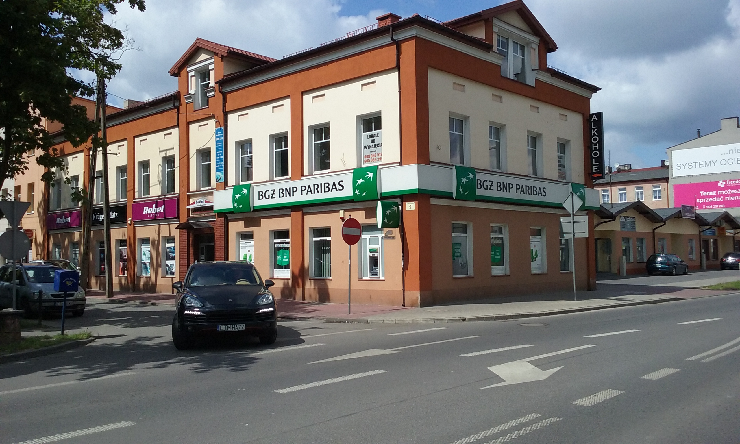 Bank BGŻ BNP Paribas w 60-tysięcznym Tomaszowie Mazowieckim, w wojewóðztwie łódzkim